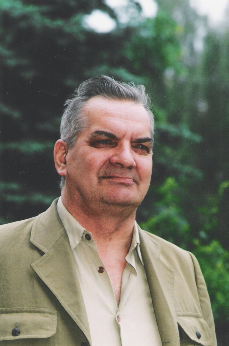 Zbigniew Polakowski, ok. 2000. Fot. W. Zawadzki